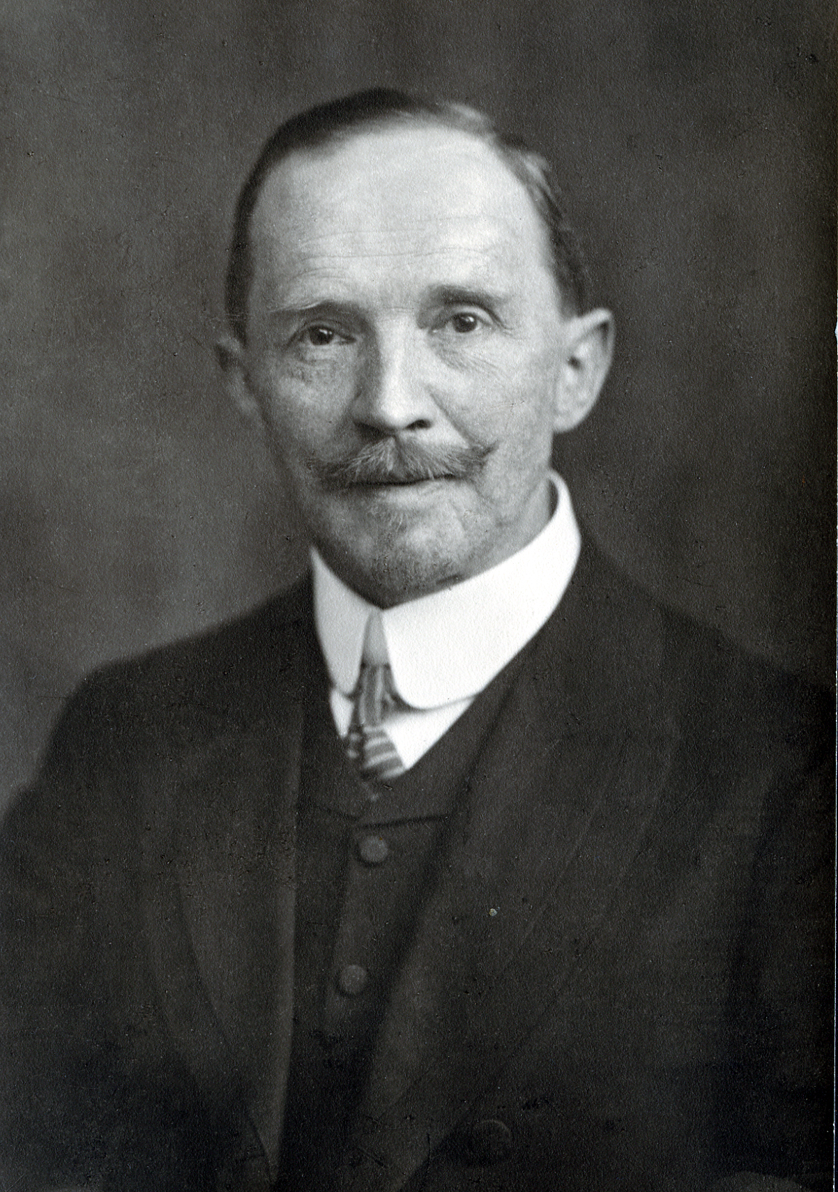 Porträtfotografie des Chirurgen Arthur Barth